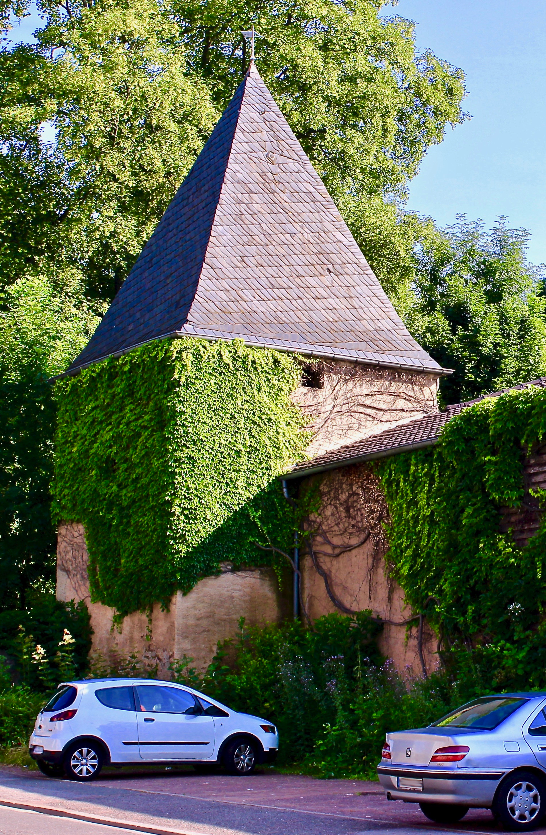 Turm der Schlossanlage zu Fremersdorf, eines Ortsteils von Rehlingen-Siersburg im Landkreis Saarlouis.